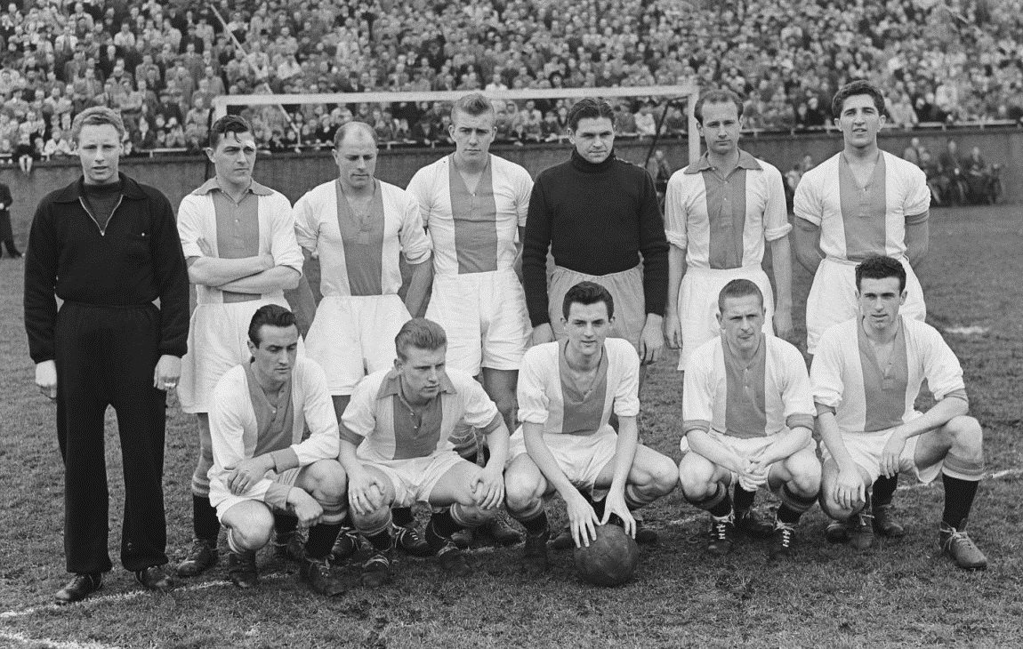 Ajax tegen Be Quick. Ajax elftal.Staand vlnr: Ad van der Pol, Jan Potharst, Gerrit Krist, Henk Elzer, Ad Visser, Co Bouwens, Hans Boskamp; zittend vlnr: Klaas Bakker, Arend van der Wel, Theo de Groot, Gé van Dijk, Leen Bartels.